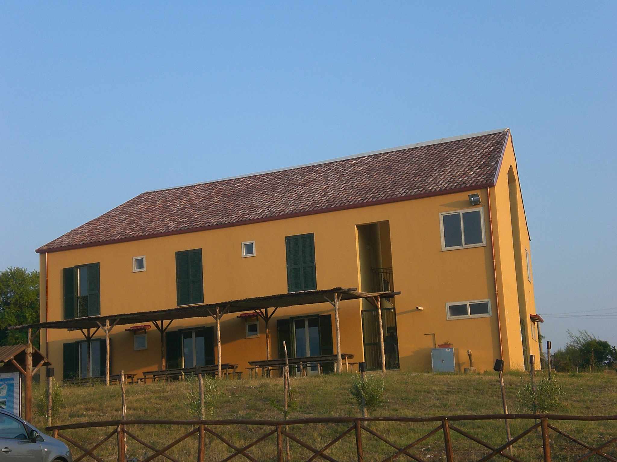 Oasi WWF di Persano: Centro visite This is a photo of a monument which is part of cultural heritage of Italy. The authorisation for taking photos of this object was provided by the World Wide Fund for Nature Italy.